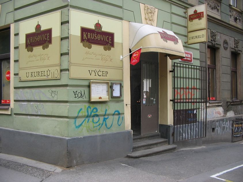 Hospoda U Kurelů, Praha-Žižkov, na nároží Kubelíkova - Chvalova.